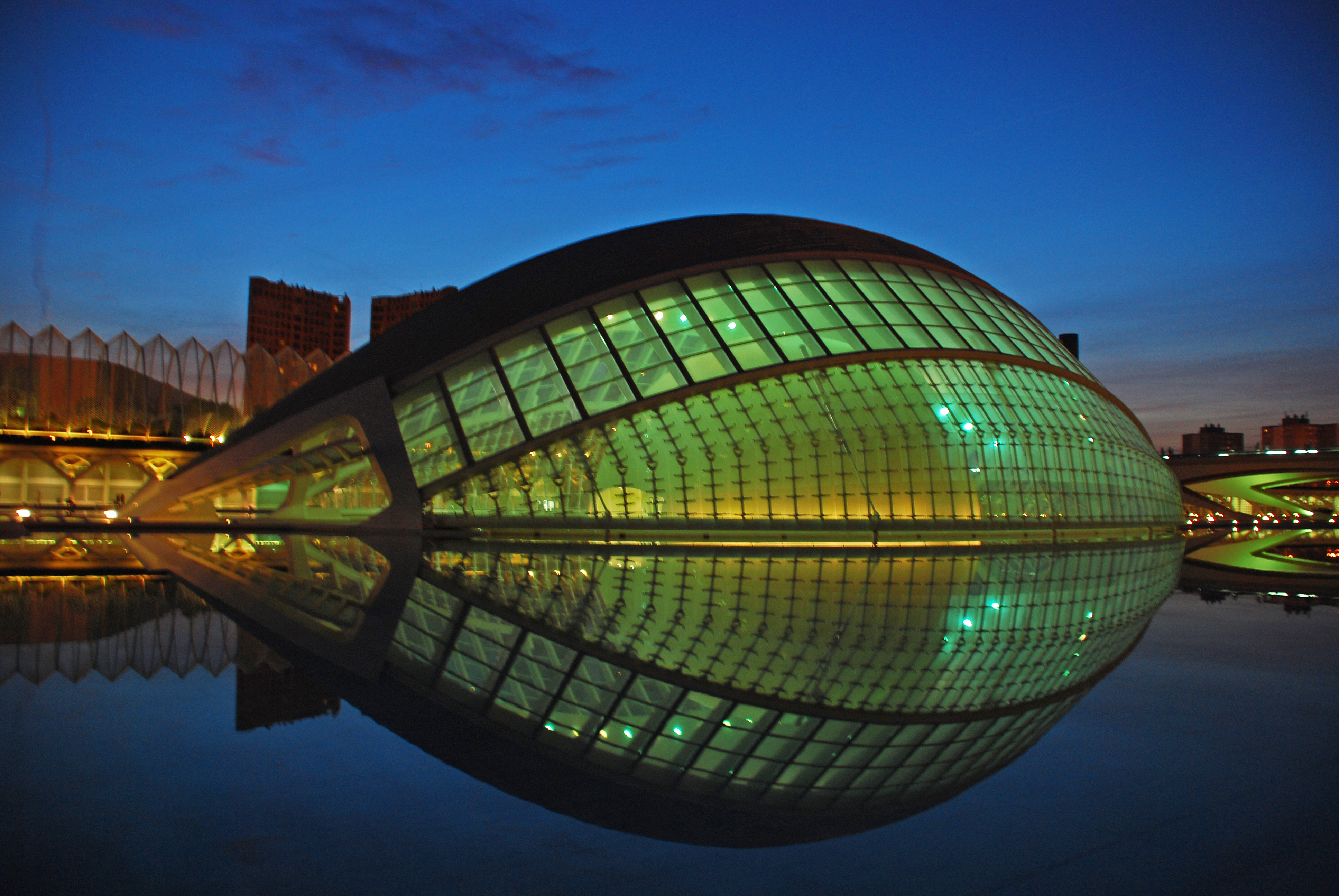 L'Hemisfèric na Cidade das Artes e das Ciências.